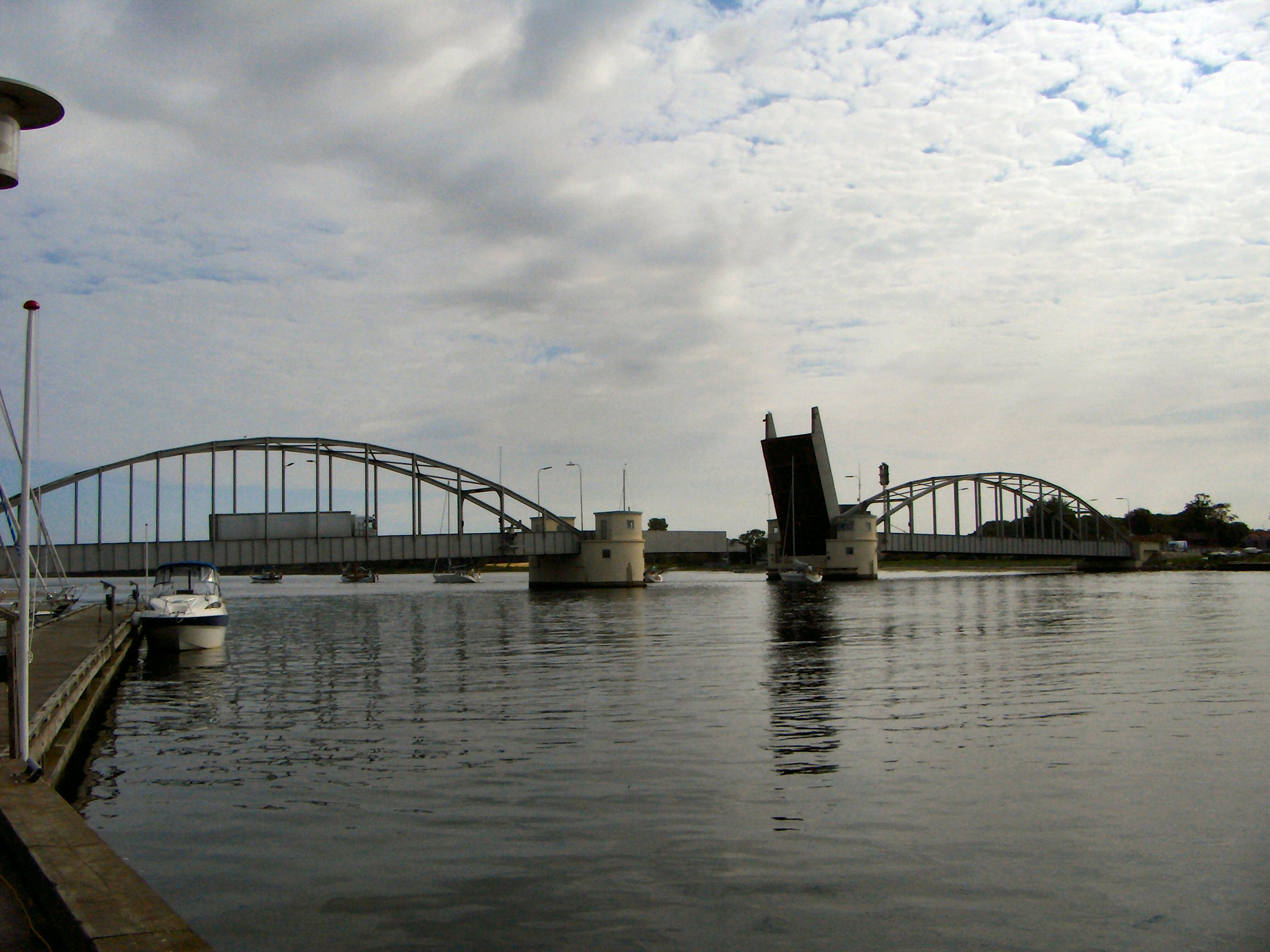 Guldborg brug